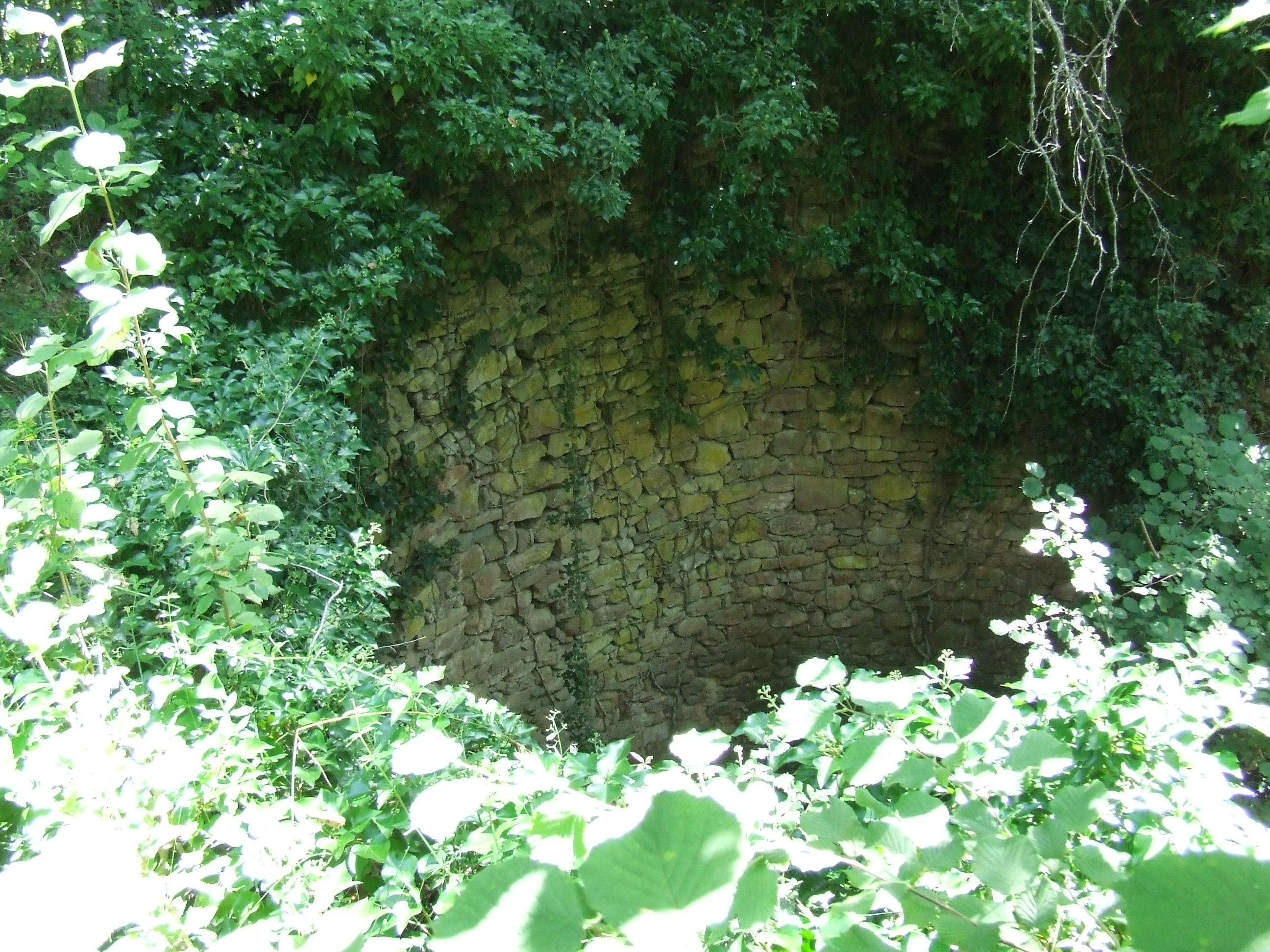 La Poua Vilardell (Castellcir, Moianès)